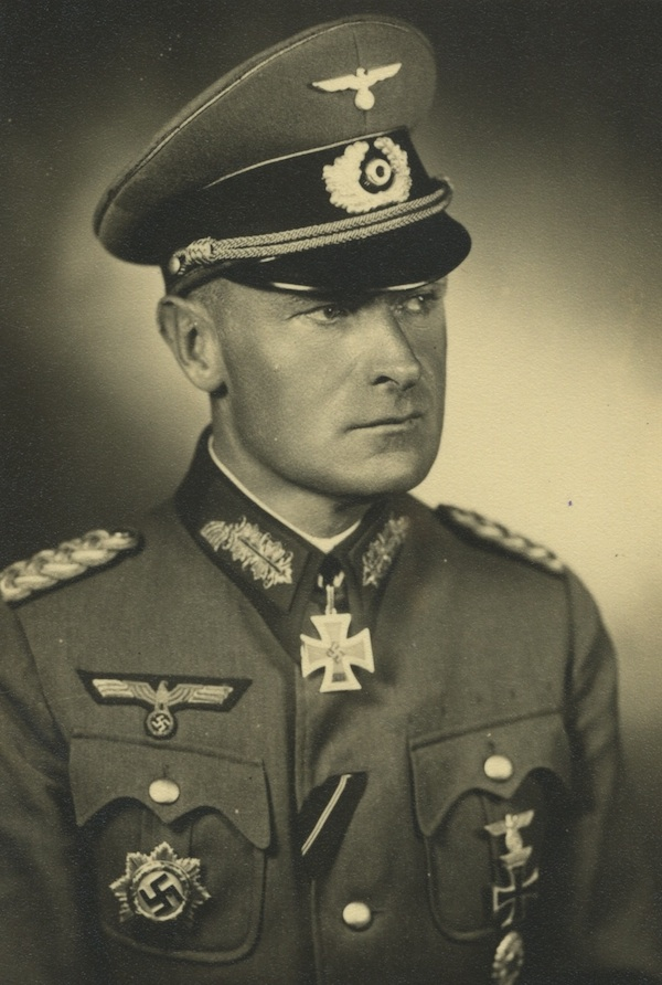 Heinrich Deboi ( 1893-1955), deutscher Wehrmachtsoffizier